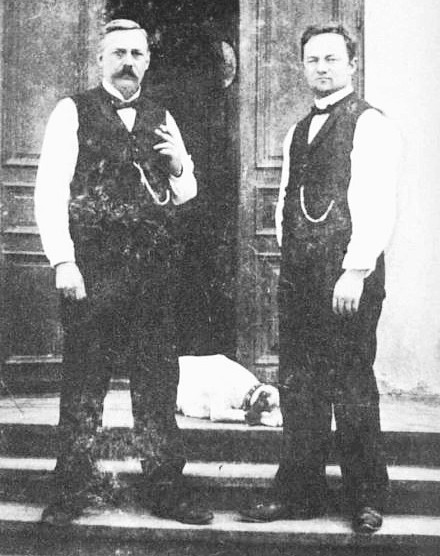 Konservatorn Gustaf Kolthoff med sonen Kjell Kolthoff.